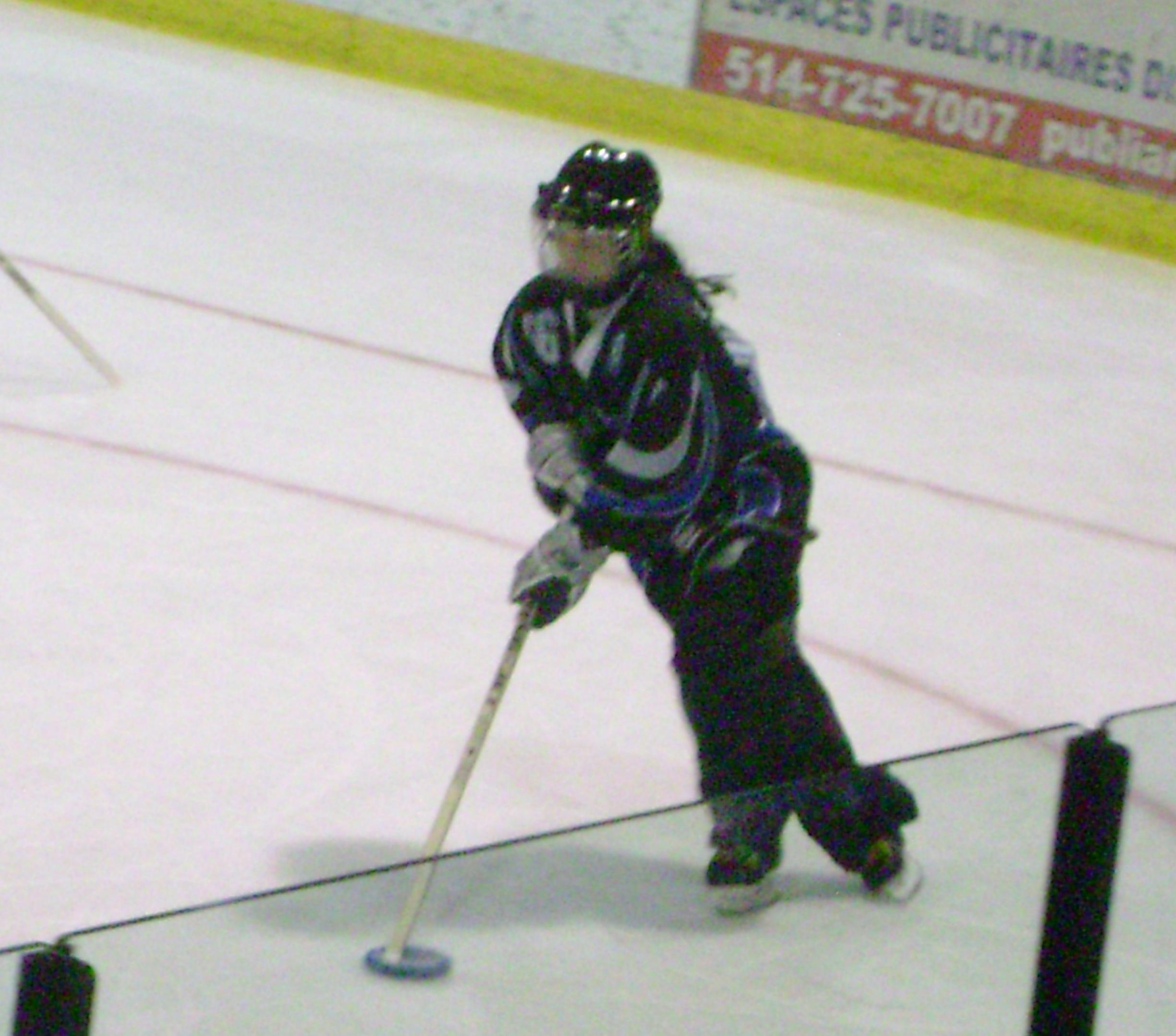 Stéphanie Séguin, du Montréal Mission lors d'une partie de la LNR